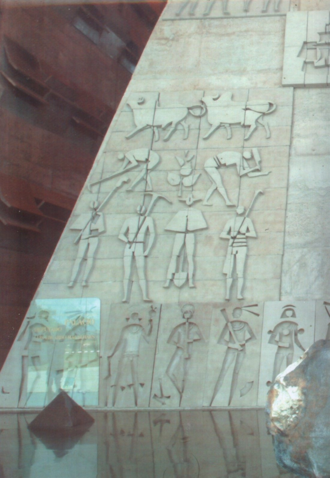 Assembléia Legislativa do Estado da Bahia - Brasil. Painel de Carybé